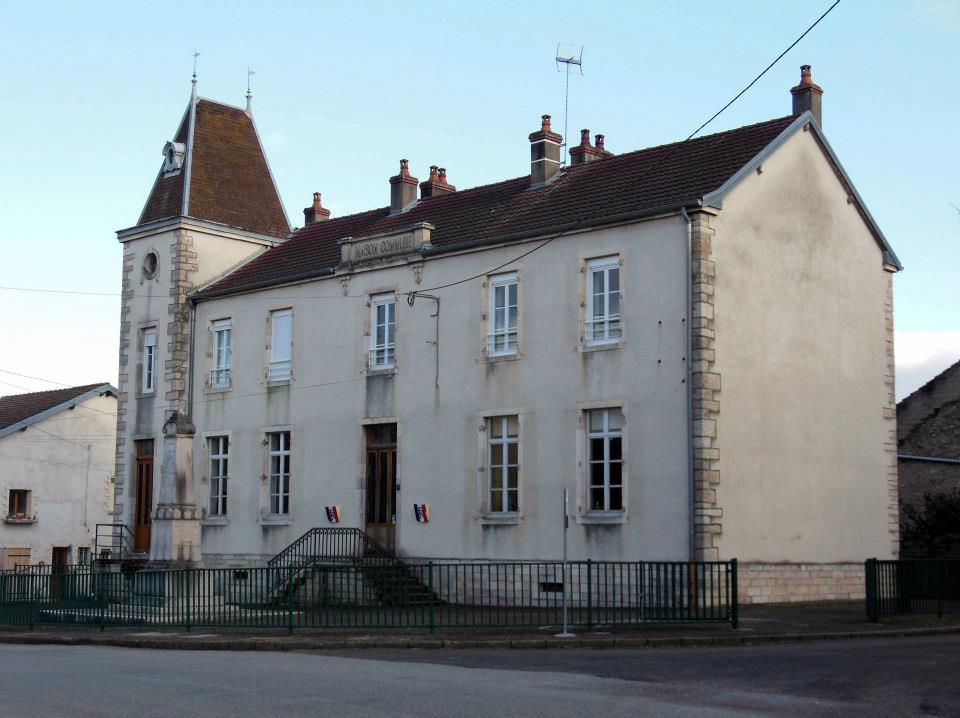 Mairie, Rue du Bois, à Brans (Jura).